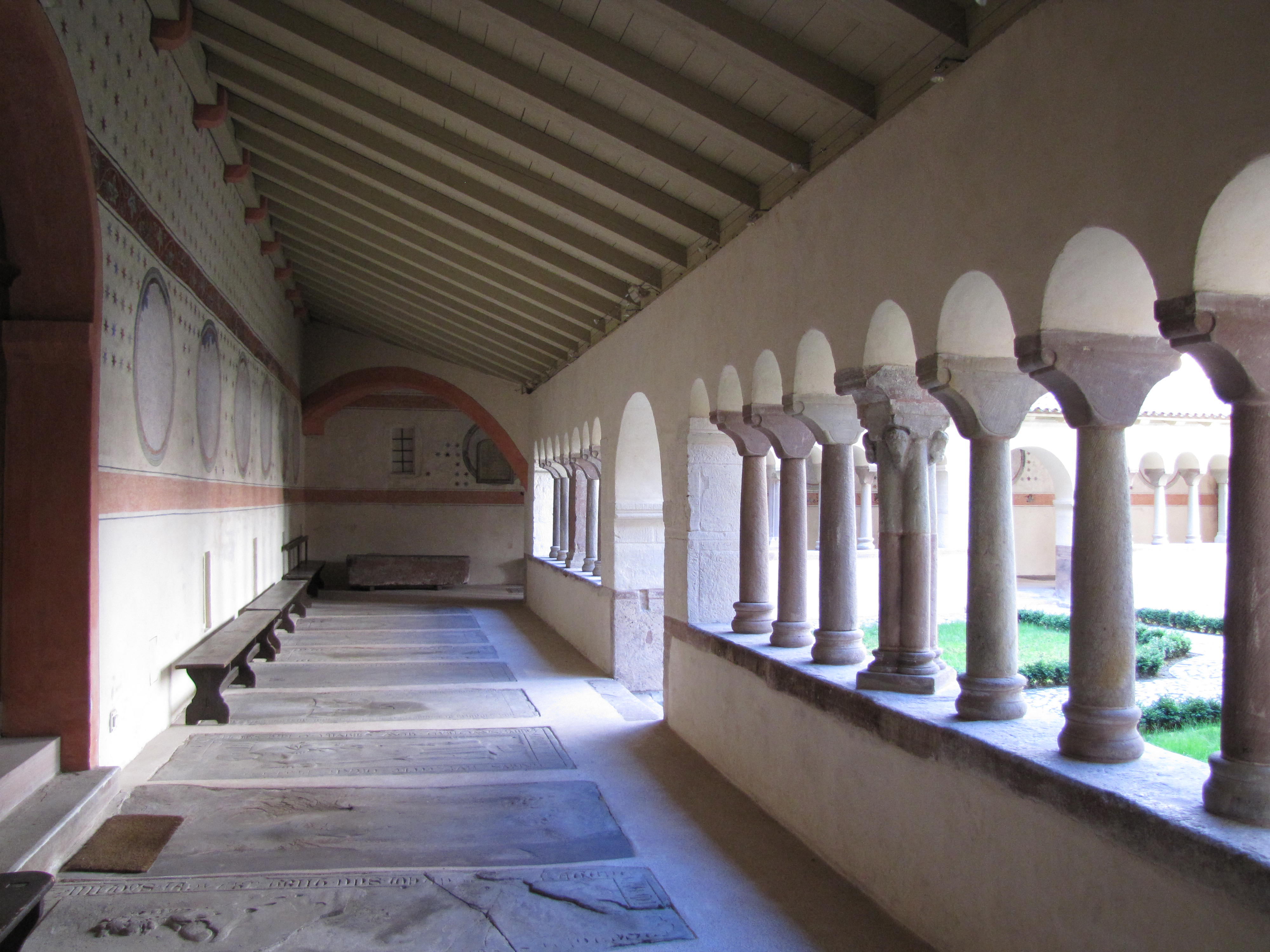 Alsace, Bas-Rhin, Église protestante Saint-Pierre-le-Jeune de Strasbourg (PA00085030).Cloître après restauration (1031-XIV-XVe): .